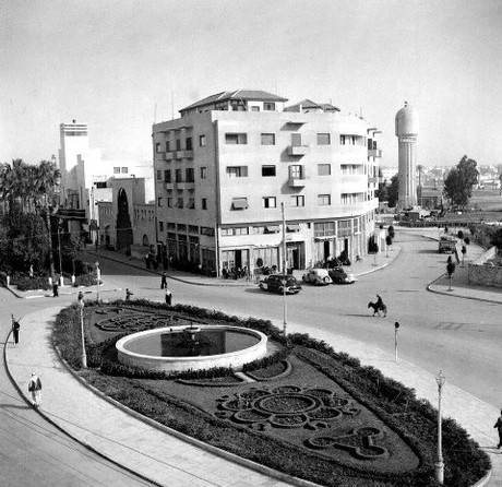 כיכר עיריית יפו בשדרות ירושלים - ברקע : בניין עיריית יפו , קולנוע פארוק , קולנוע אלהמברה. בצד ימין מגדל המים על יד אצטדיון בלומפילד שנהרס